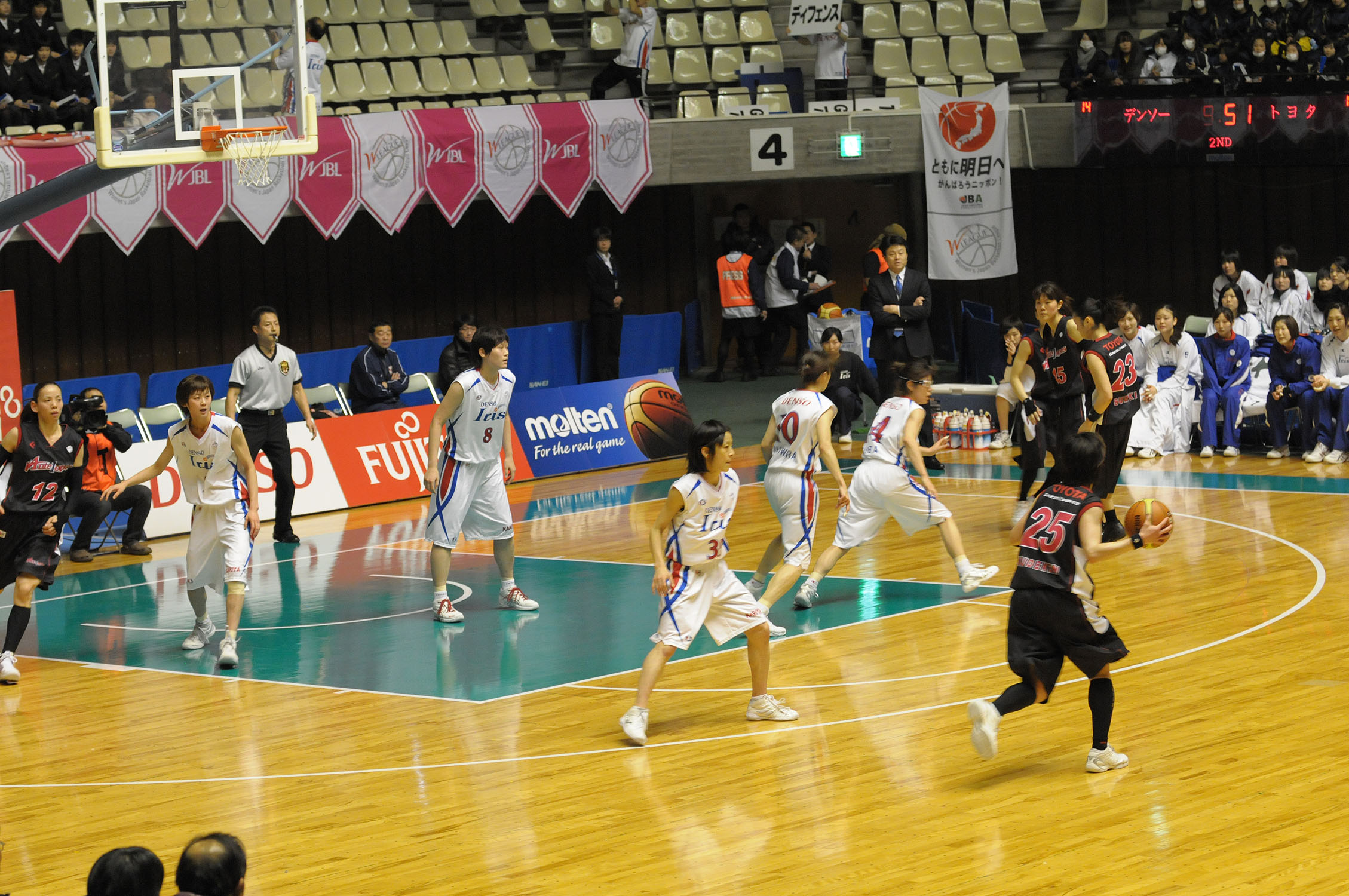 WJBL 11-12プレーオフセミファイナル、トヨタ対デンソー。秋田県立体育館で。